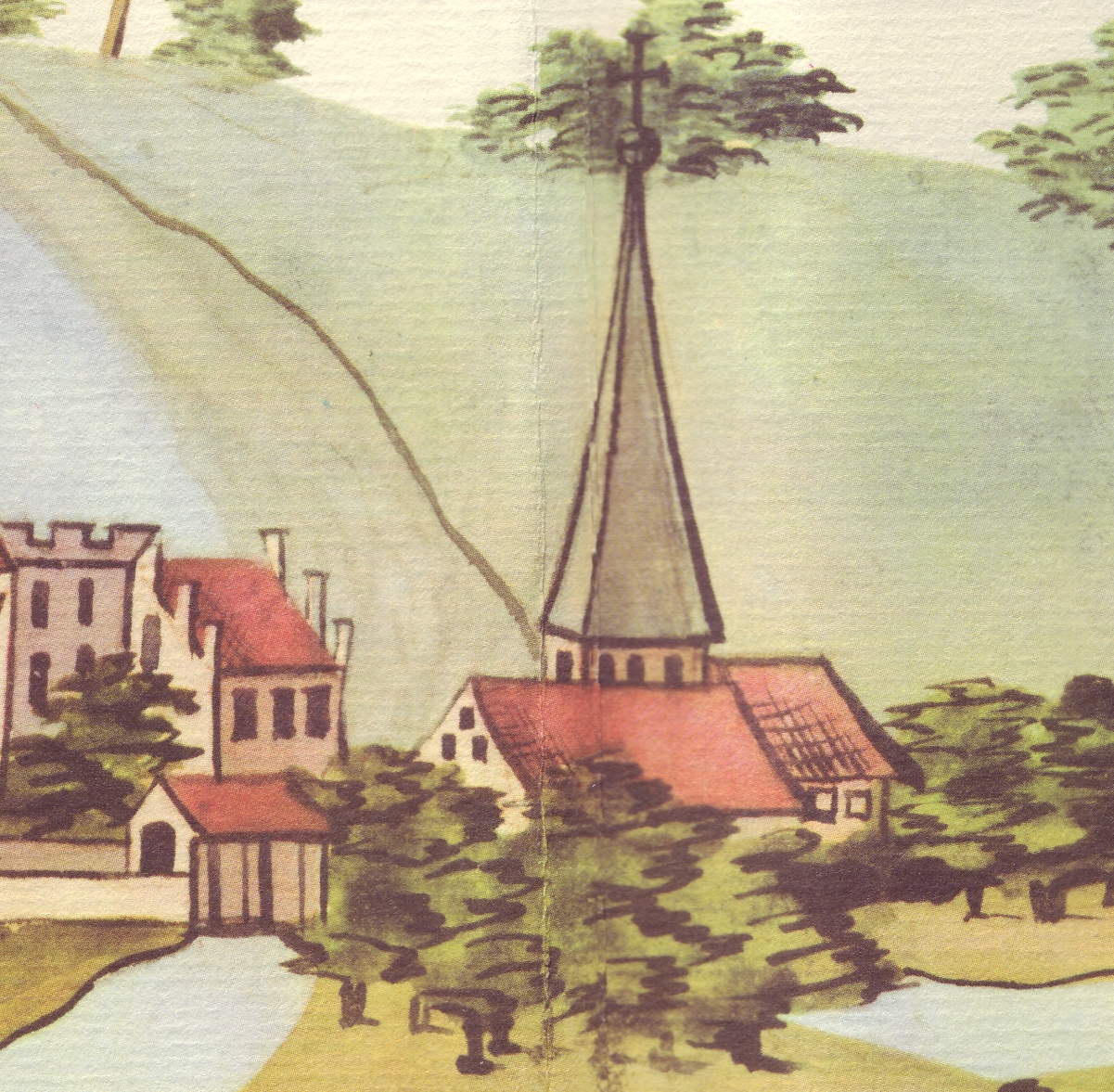 Marienkirche Demmin um 1610–1615, Ausschnitt aus der Demminer Stadtansicht